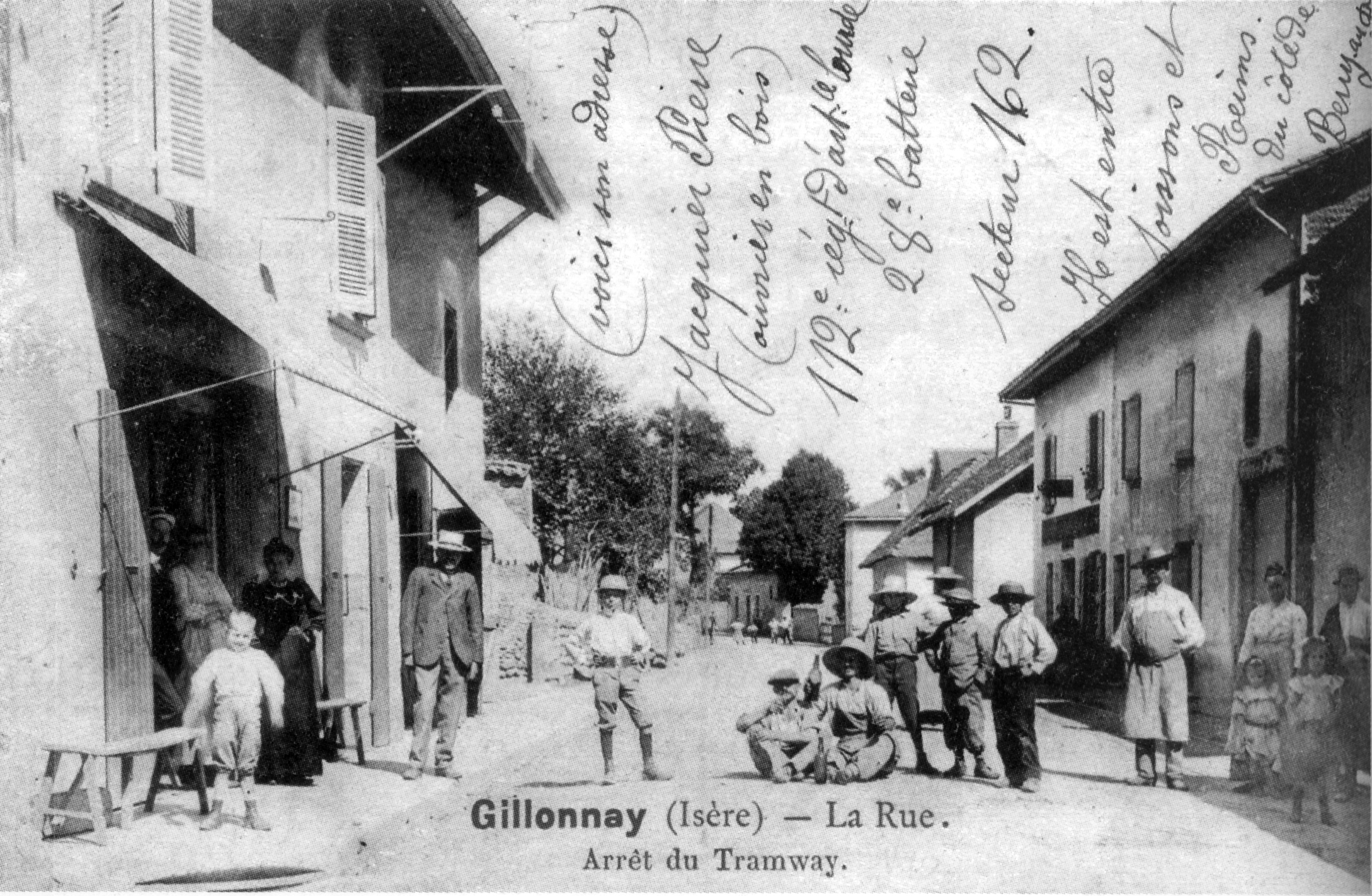 Gillonnay, la rue et l'arrèt du tramway en 1908